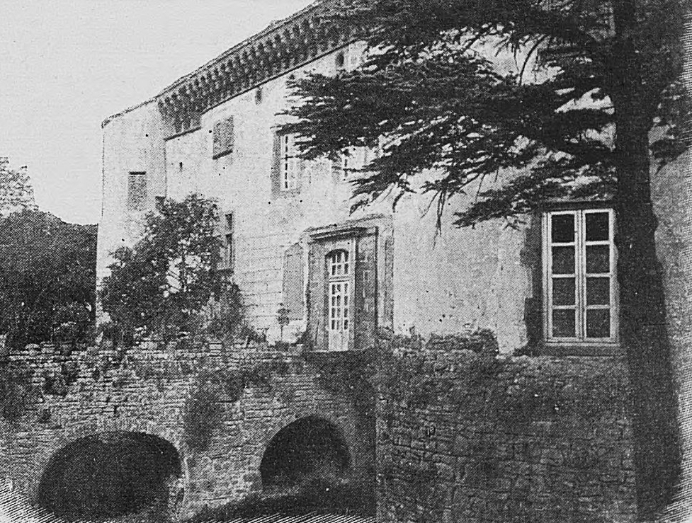 Dictionnaire illustré des communes du département du Rhône. Tome 1 / par MM. E. de Rolland et D. Clouzet.